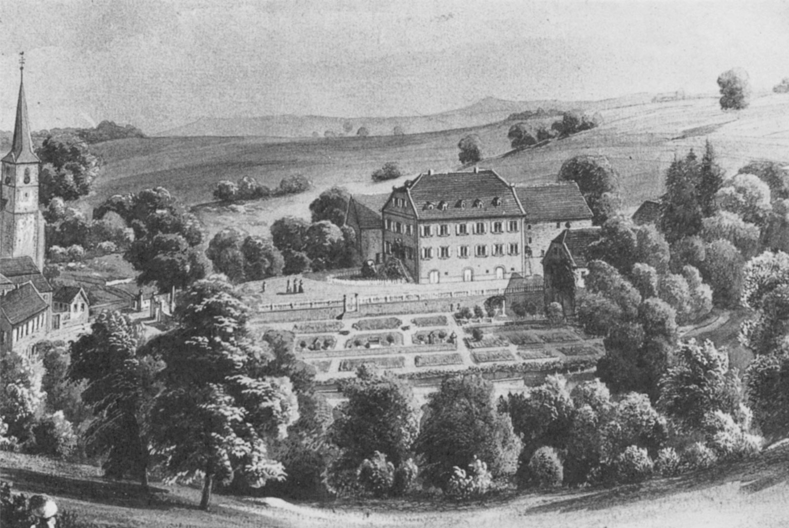 Schloss Obergimpern, Darstellung eines unbekannten Malers um 1860, Ausschnitt aus einer 37 x 51 cm großen Darstellung im Archiv der Familie von Bülow, reproduziert in Bad Rappenauer Heimatbote 11, 1999, S. 39.